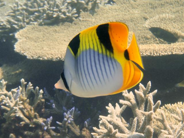 Chaetodon falcula en Maldivas